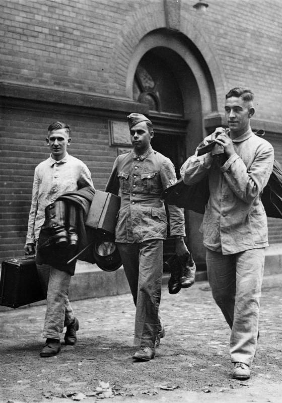 Ankunft neuer Rekruten Scherl Bilderdienst Rekruten Einstellung; Kameradschaft zwischen den "Alten" und "Neuen" von Anfang an. (Generalkommando III Armeekorps, Wehrkreiskommando III, Abteilung 1c; genehmigt) 19.Okt.1936 14898-36 [Berlin?]